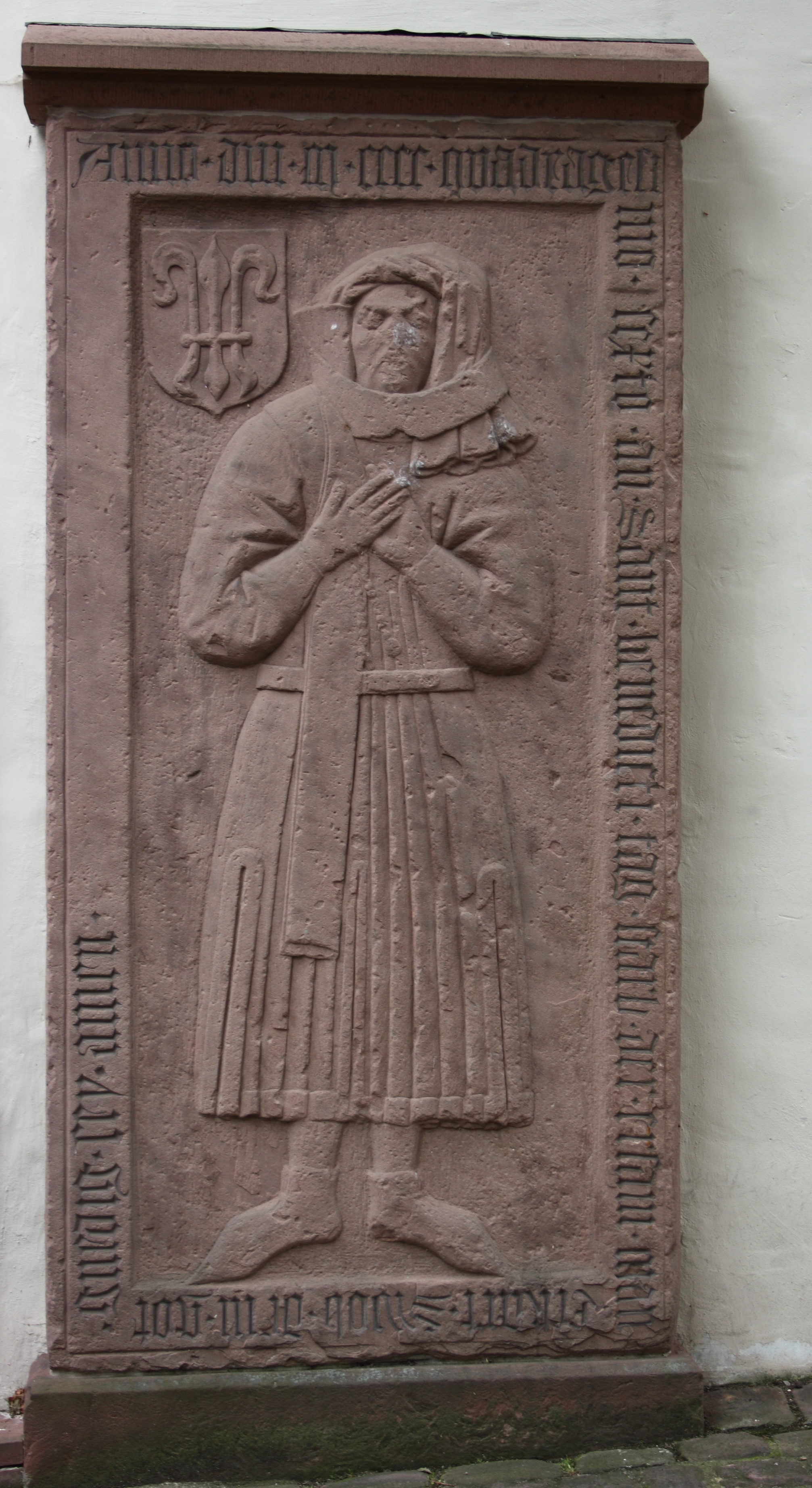 katholische Pfarrkirche St. Michael in Lohr am Main im Landkreis Main-Spessart (Bayern)